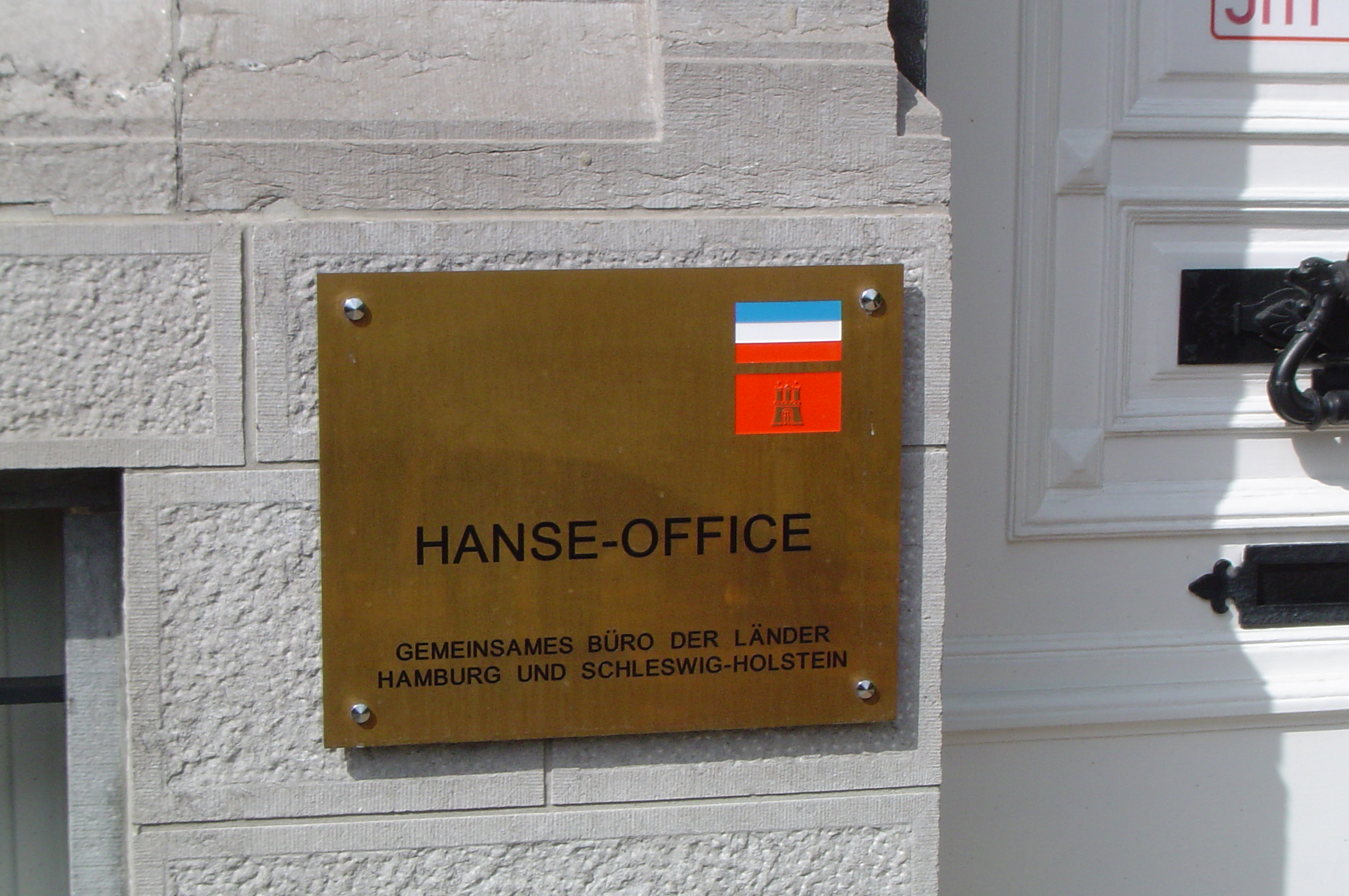 Selber fotografiert